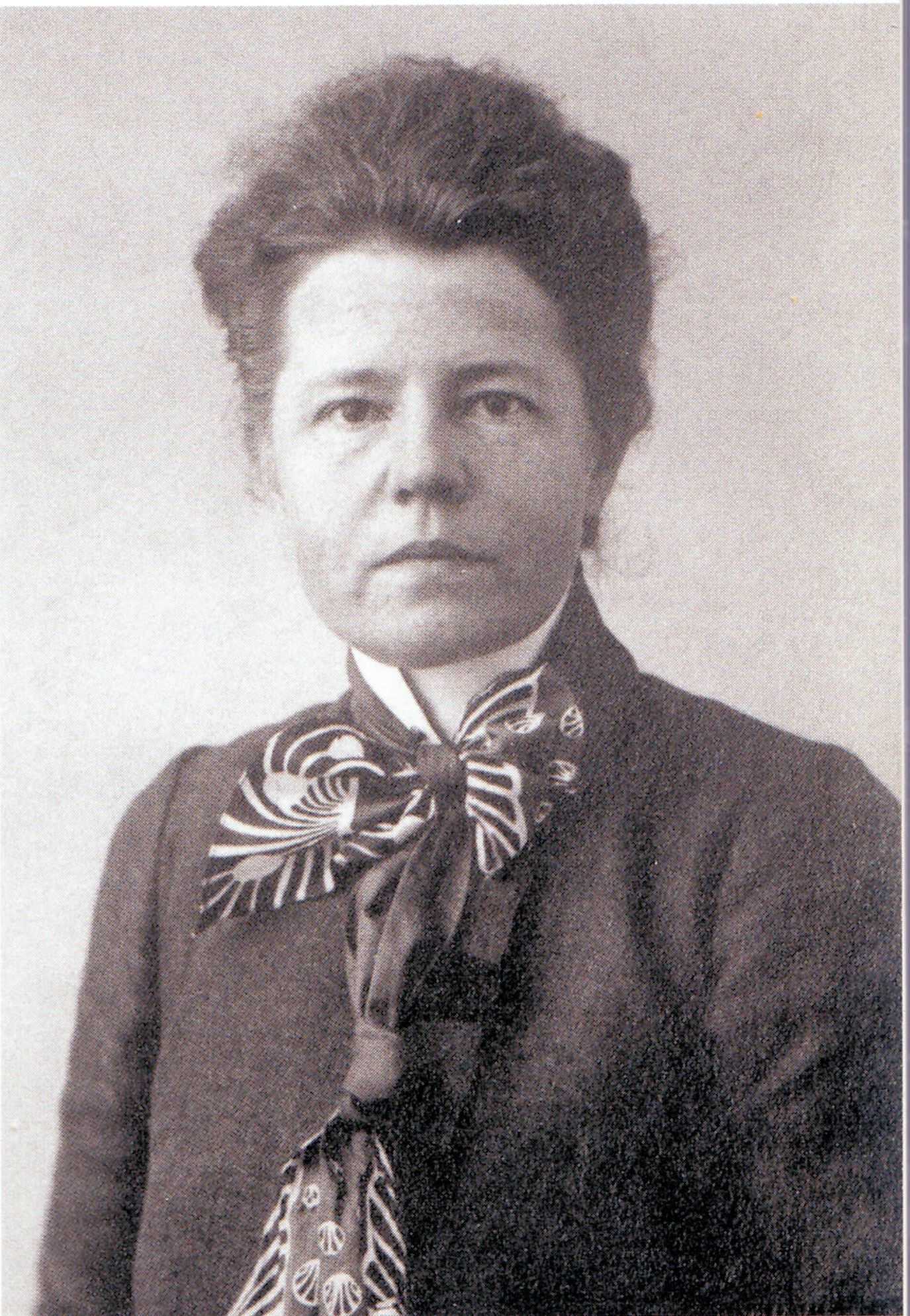 Signe Brander